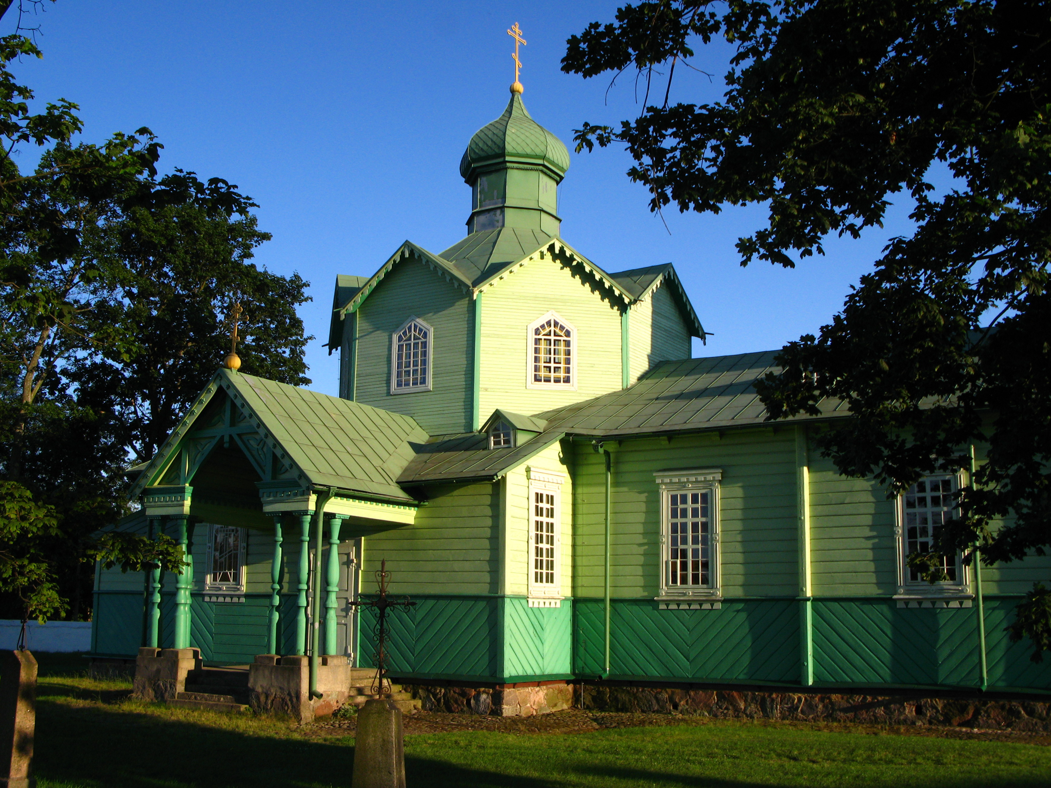 Cerkiew prawosławna, par. p.w. Podwyższenia Krzyża, drewn., 1882-1885 Narew, Narew